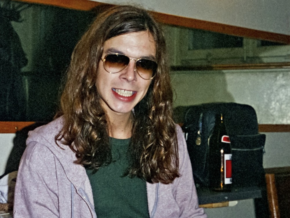 Andy Ward, membre du groupe Camel, photographié à Zürich en 1975.